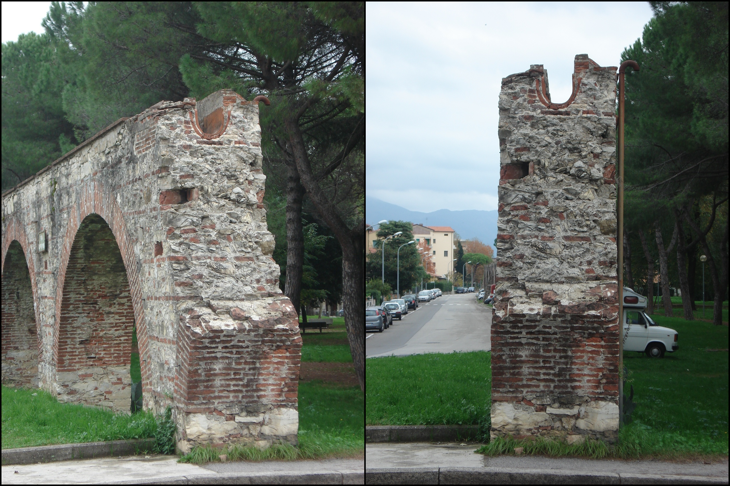 Sezione dell'Acquedotto Mediceo, troncato per aprire via Silvestro Centofanti a Pisa. È chiaramente visibile il condotto in cui scorreva l'acqua.